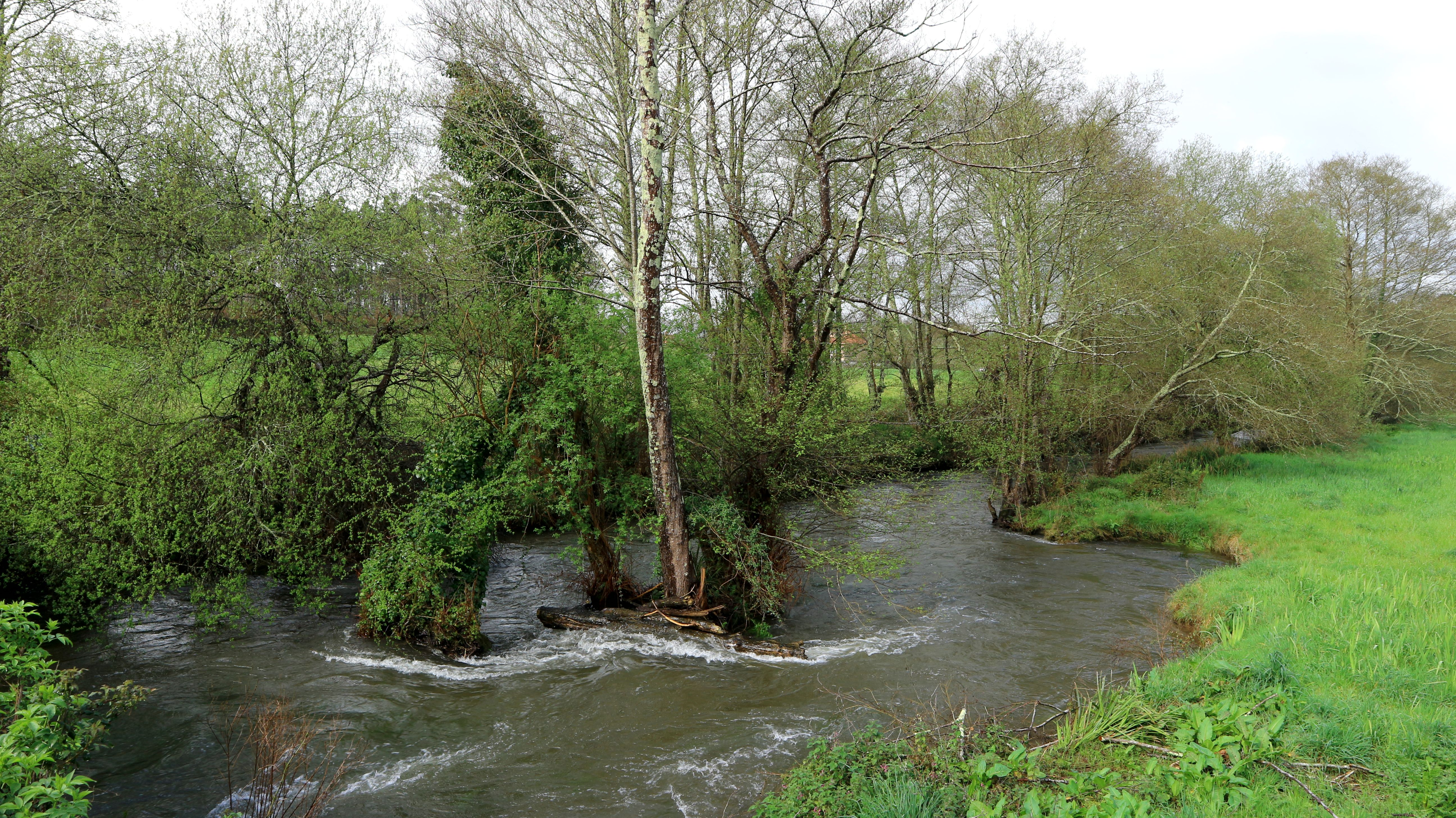 Ribeira do río Mero en Cos, preto de Limiñón. Cos, Abegondo.